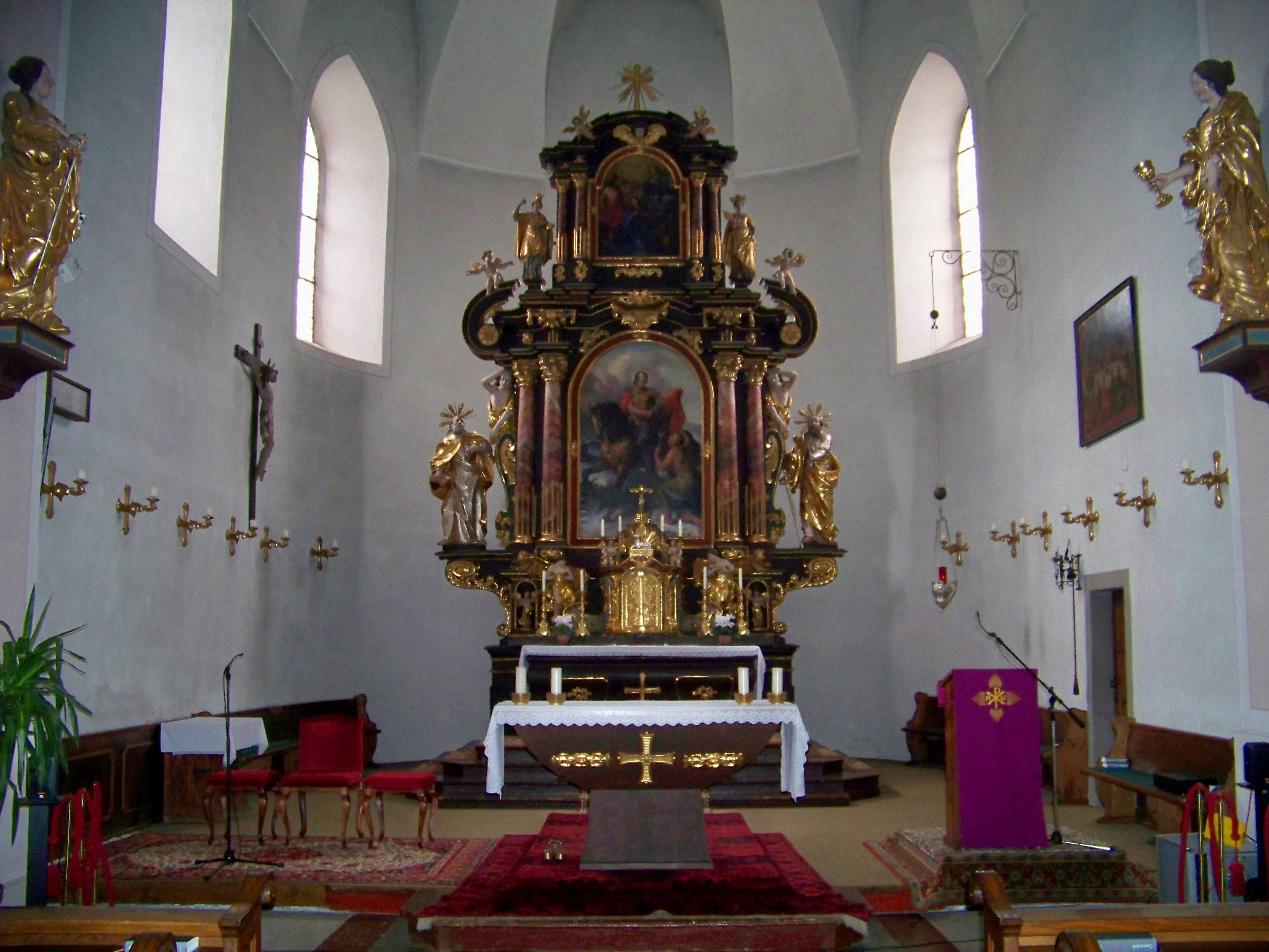 Bad Goisern kath Pfarrkirche Hochaltar